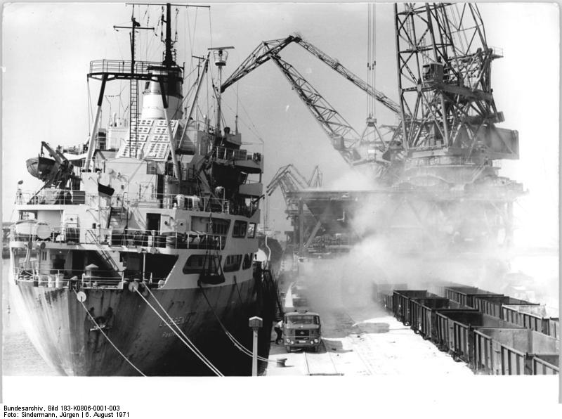 Rostock, Überseehafen, Schüttgutkai ADN-ZB Sindermann 6.8.71 Rostocker Überseehafen - Frachter "Lübbenau" brachte Phosphatmineral aus Murmansk. Bei tropischen Temperaturen und enormer Staubentwicklung löschen die Kollegen vom Betriebsteil Massengut in Tag- und Nachtschicht die Schiffsladung des Frachters "Lübbenau", der ein Apatitkonzentrat aus der Sowjetunion geladen hat. Das Phosphatmineral ist ein wichtiger Rohstoff für die chemische- und pharmazeutische Industrie der DDR und für die Herstellung von Düngemitteln. (siehe auch Foto Nr. K0806-1-4n)